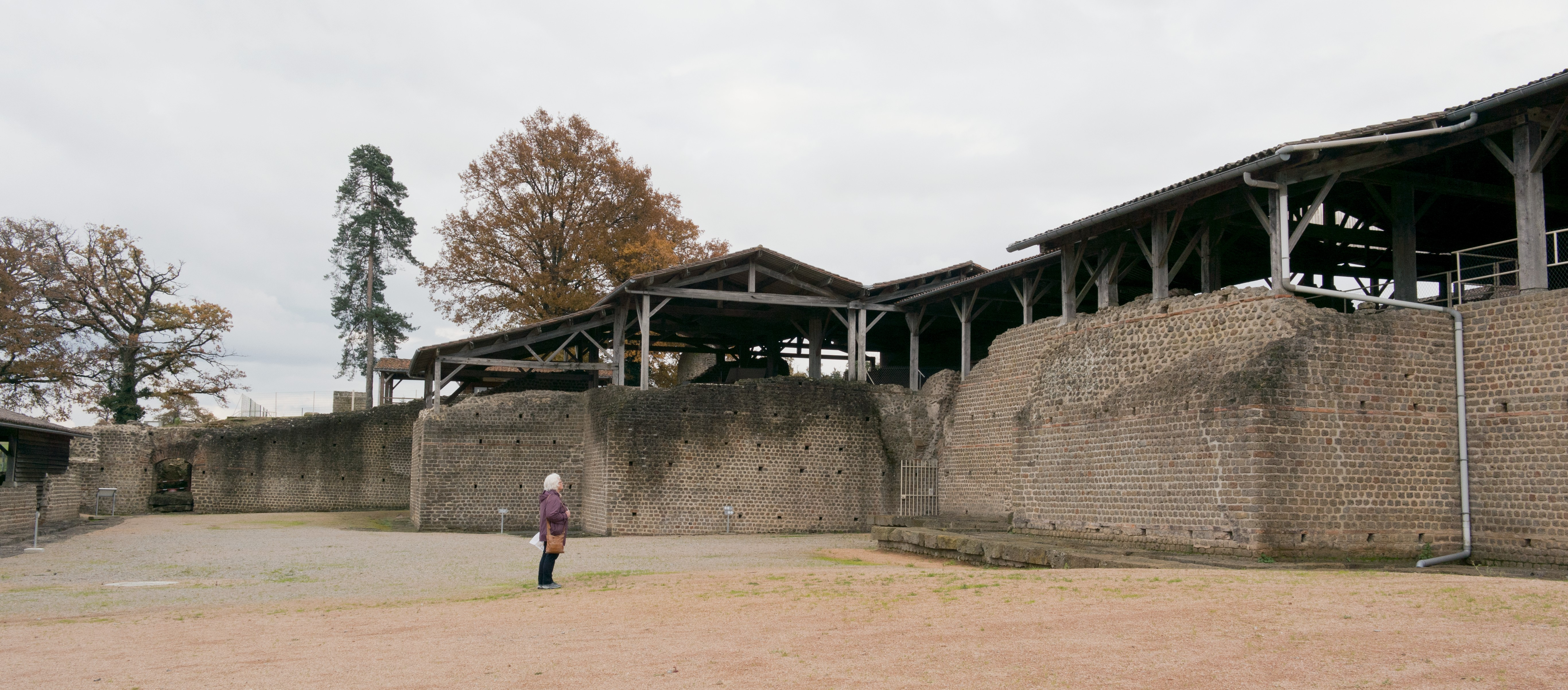 Les thermes de Chassenon à Cassinomagus, Chassenon, Charente, France. Cour du coin nord-ouest du complexe thermal, vue plein Est. Le premier bâtiment à droite est l'alveus (petit bassin) contigu au côté nord du caldarium (salle du bain chaud) qui se trouve à l'extrémité de la série de quatre bâtiments sur la façade ouest des thermes. Au centre (à droite de la personne), le frigidarium nord et (à gauche de la personne) son alveus (petit bassin) attenant. Au fond vers la gauche, le long pan de mur cache le natatio (piscine froide) du coin nord-est. Contre le côté gauche de la photo, une partie de la galerie marquant le périmètre nord du complexe thermal. Pour le plan des thermes, voir Hourcade et al. 2011, « À l’ouest d’Augustoritum, du nouveau sur Cassinomagus (Chassenon, Charente) », paragr. 16, fig. 6. .